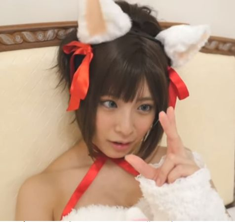 This file has been extracted from another file: 2018050202-阿部乃みくさん.webm Play media